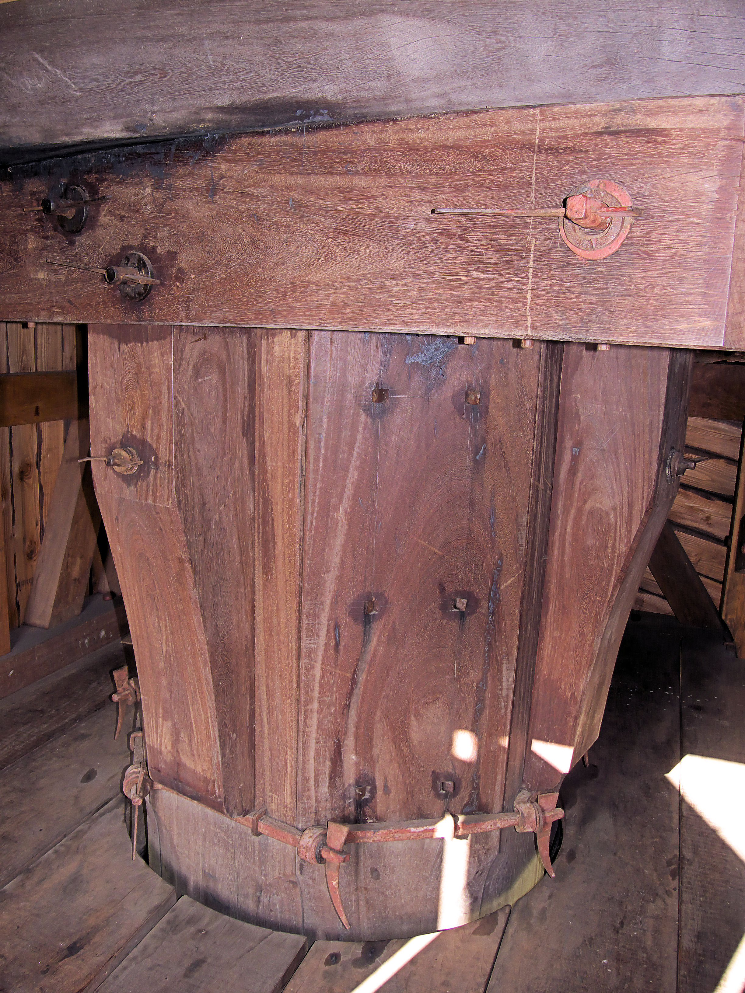 Noordeveldse molen, Dussen, Netherlands, koker met bovenzetelbalk